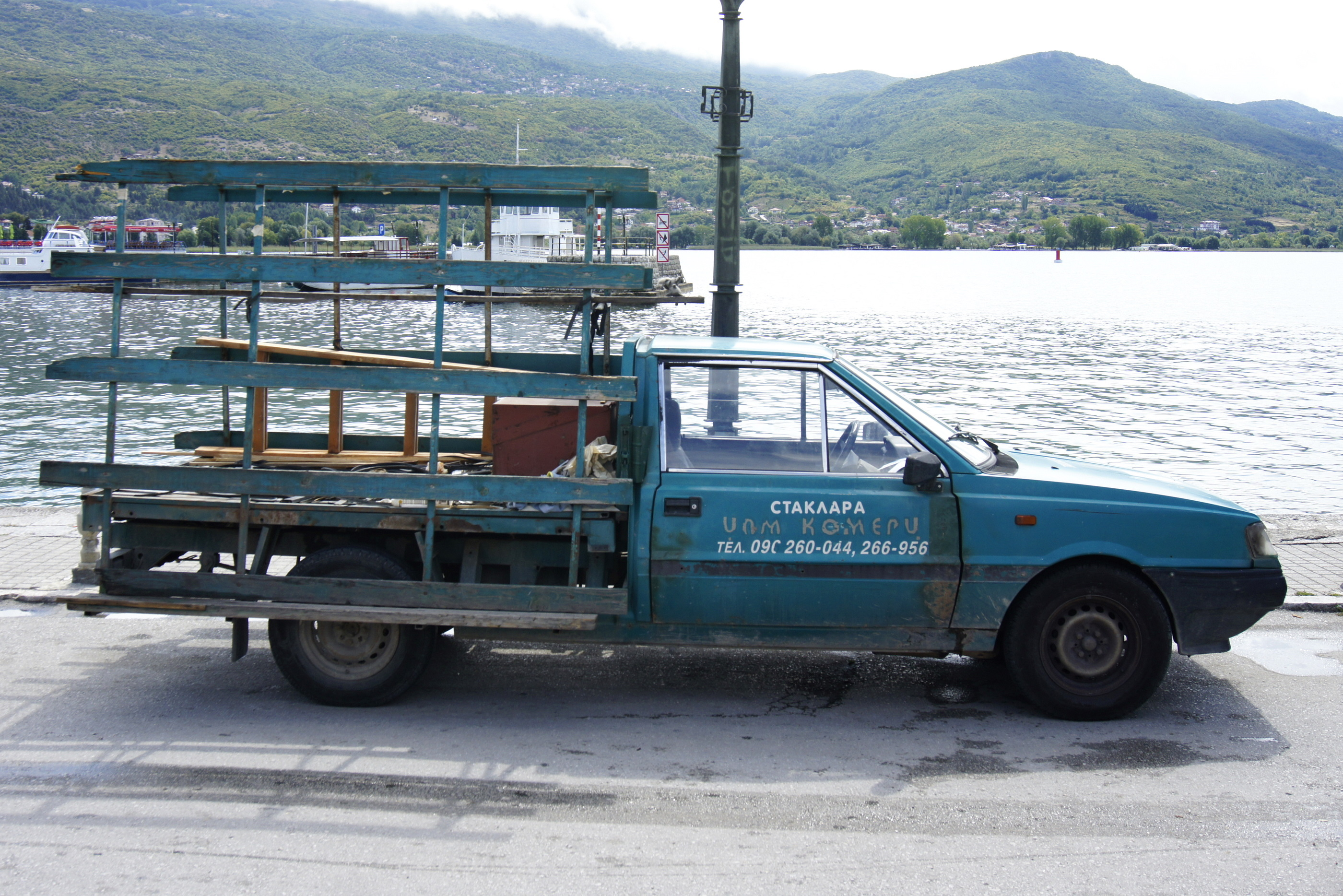 Macedonia. FSO Polonez Truck ST z zabudową do przewozu tafli szkła